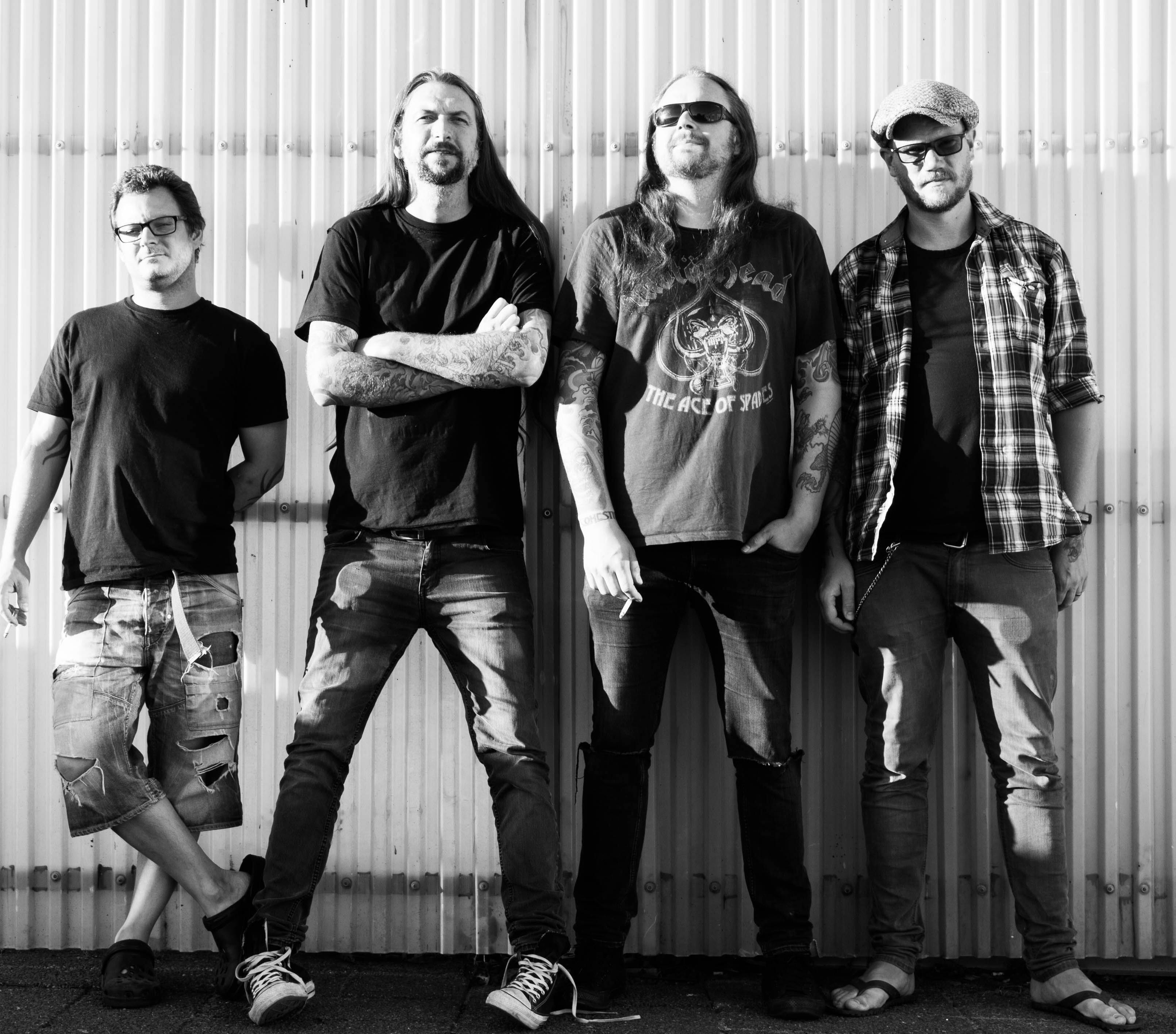 Bandfoto